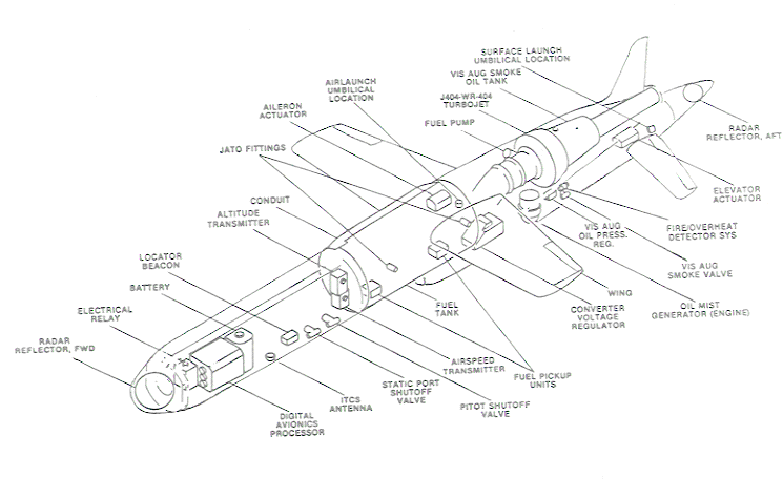 BQM-74E Diagram